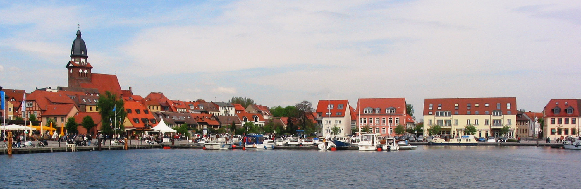 Beschreibung: Waren (Müritz) - Stadthafen Fotograf: Darkone, 14. Mai 2005